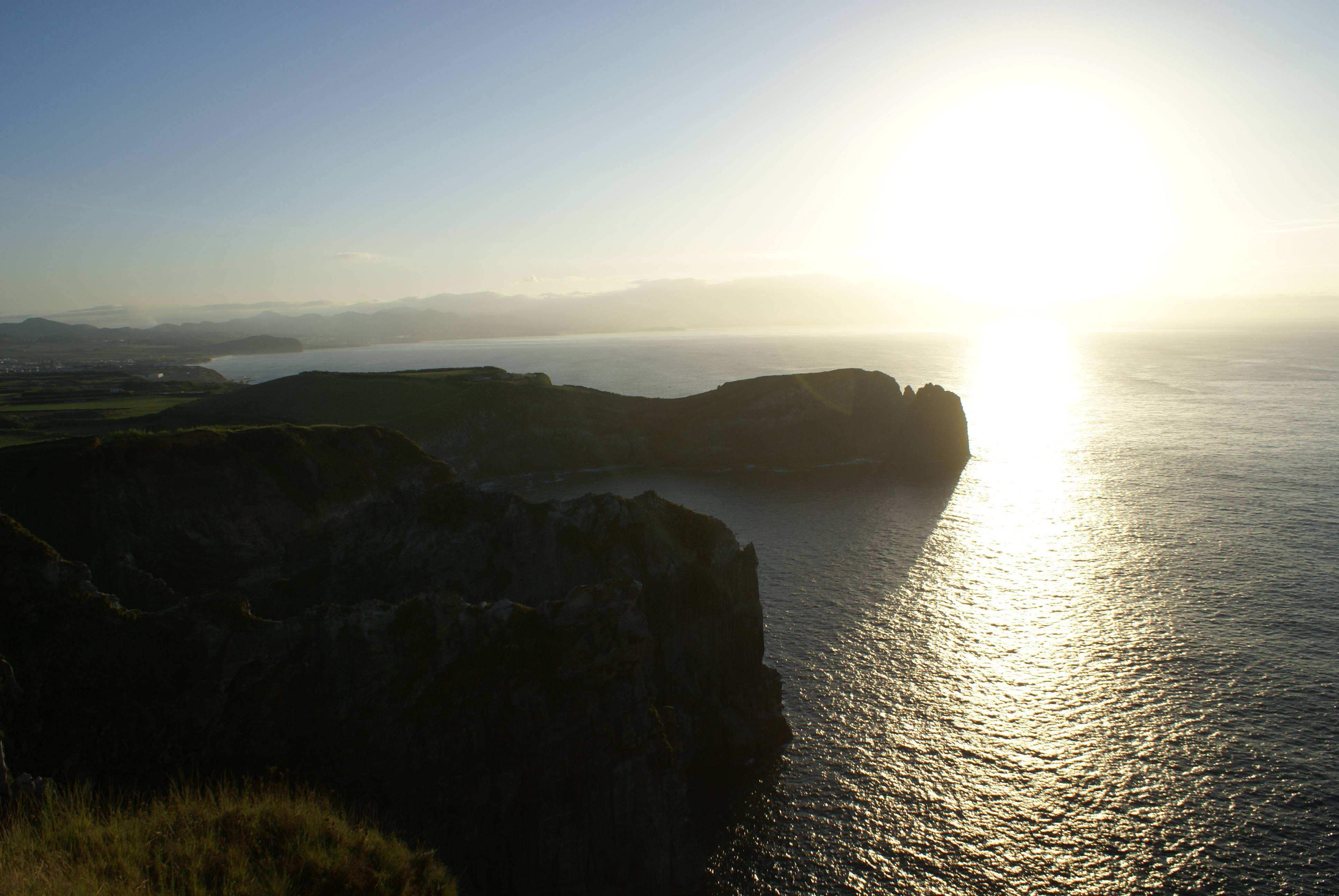 Miradouro do Cintrão, Ribeira Grande, ilha de São Miguel, Açores